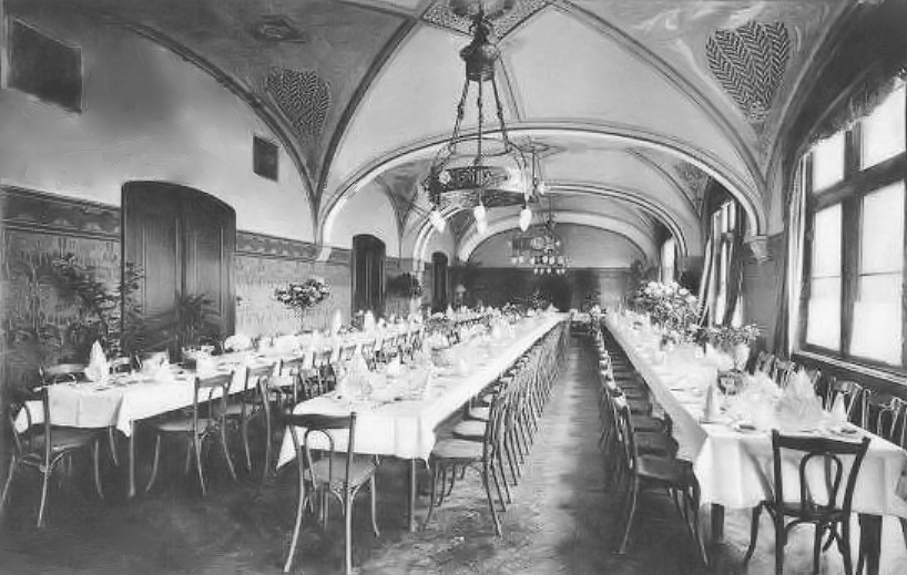 Kleiner Festsaal im Hotel Vereinshaus in Essen (heute Hotel Essener Hof), 1912